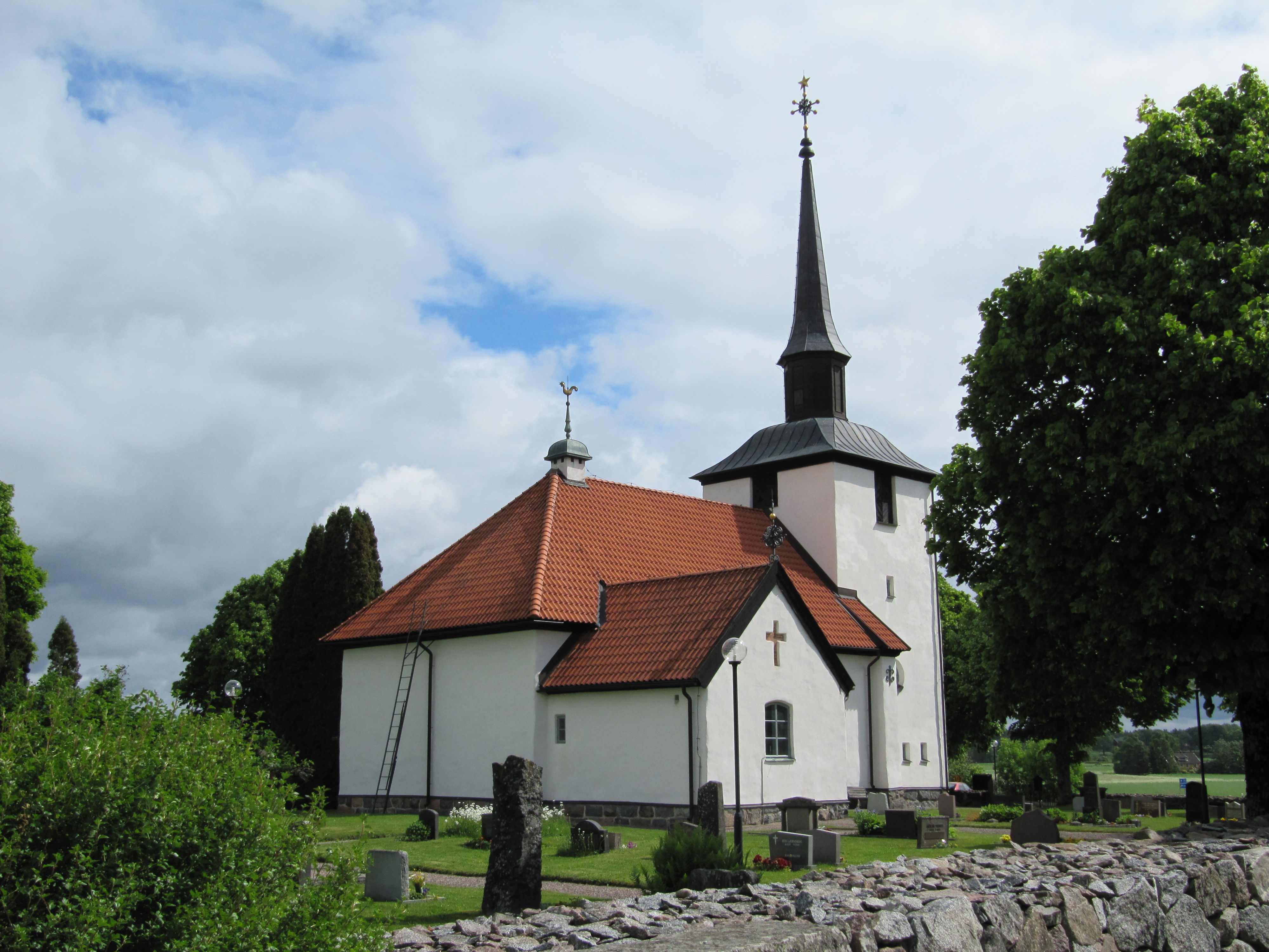 Ramsta kyrka